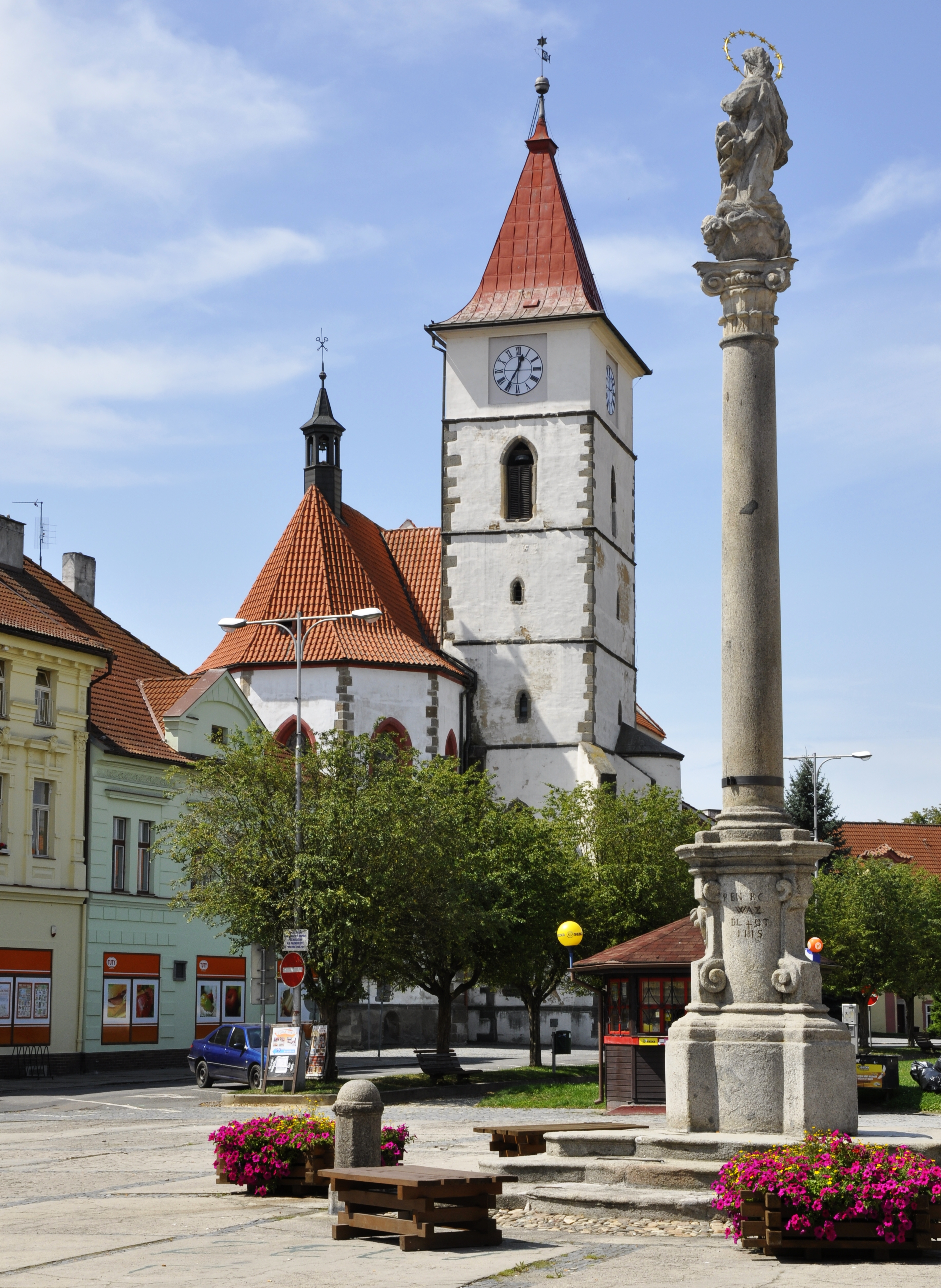 Kostel svatých Petra a Pavla, Mírové náměstí, Horažďovice.